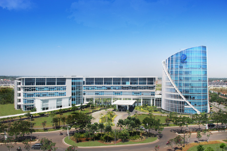 Kategori:Universitas di Indonesia